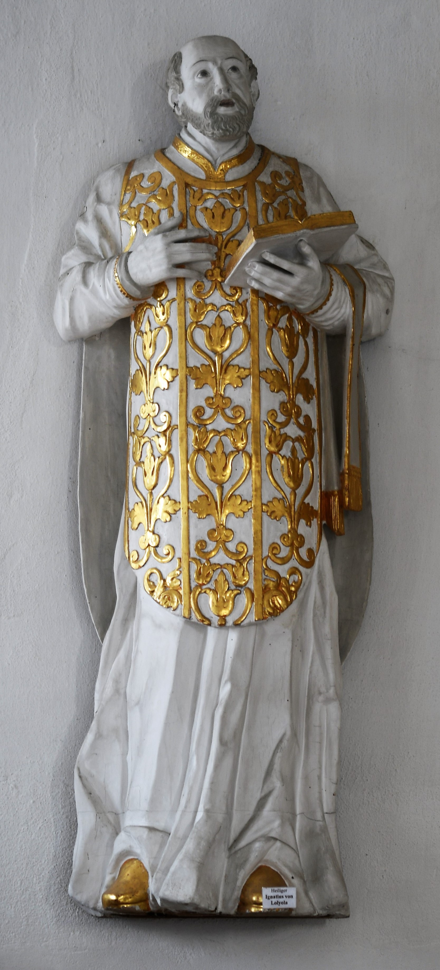 Interior of St. Petrus (Kastl): Statues of Saint Ignatius of Loyola